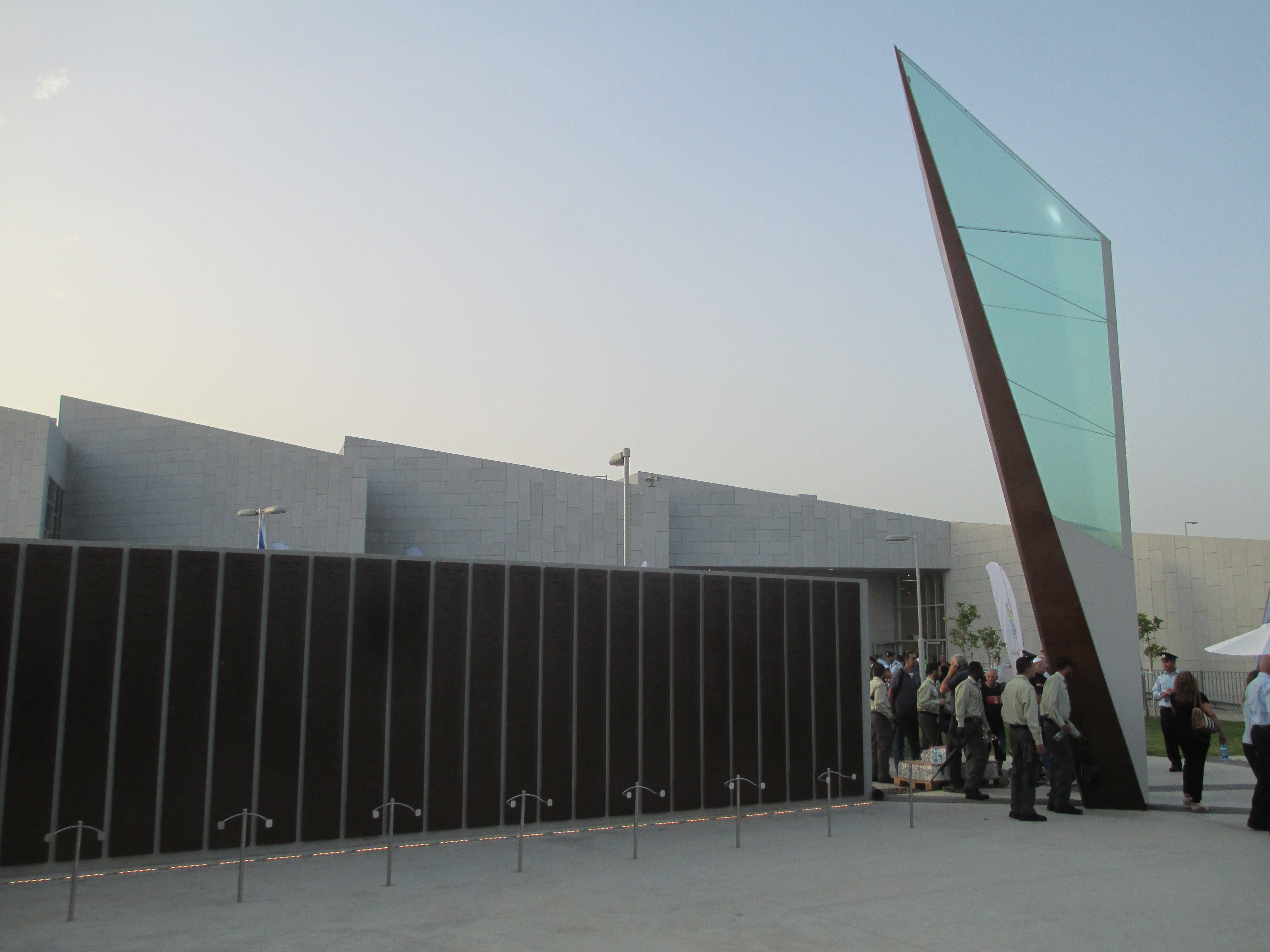 אנדרטת זיכרון לחללי משטרת ישראל במכללה הלאומית לשוטרים בבית שמש